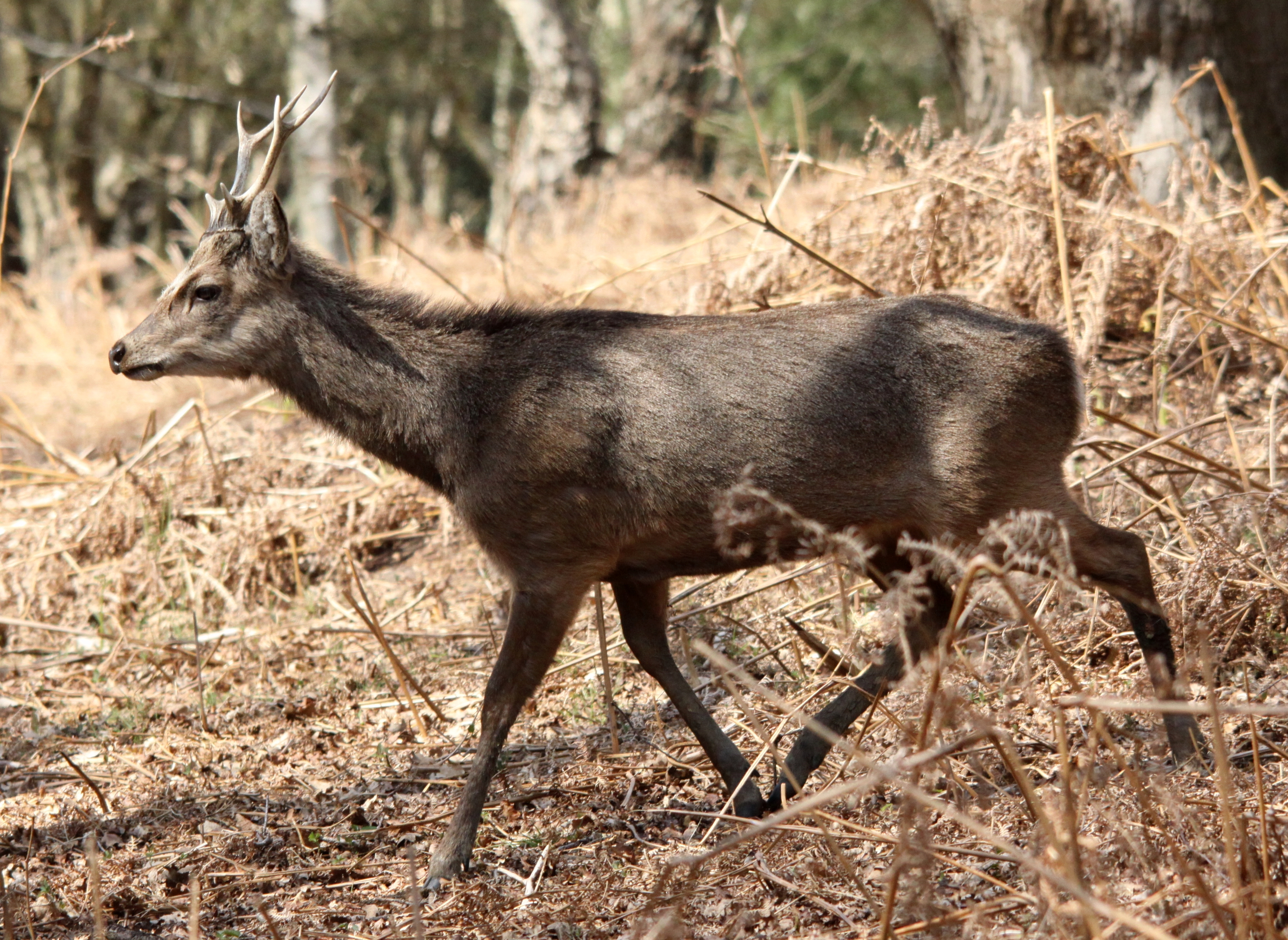 Cervus nippon Sika Deer. Arne, Dorset